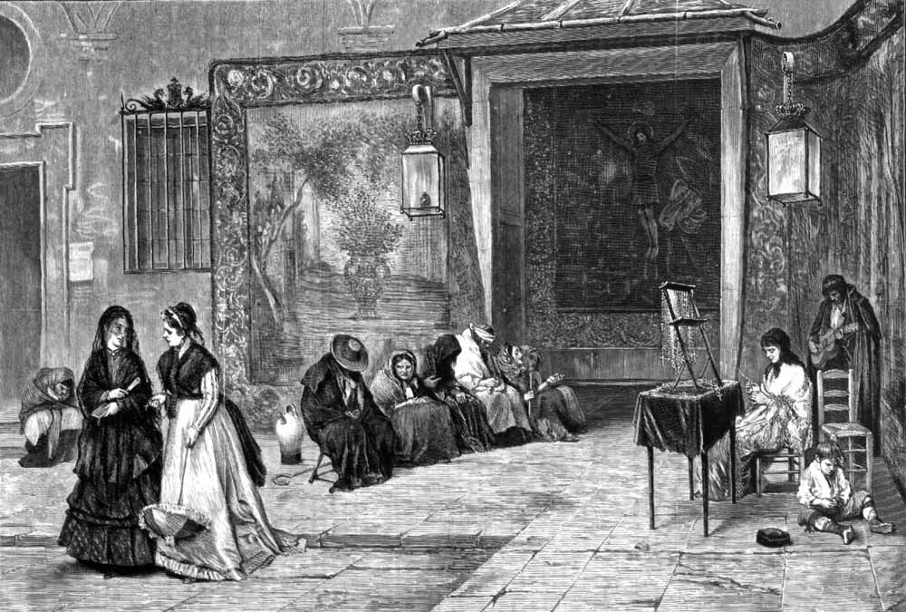 Atrio de la iglesia antigua de San Ginés de Madrid, copia del cuadro de Raimundo de Madrazo. Publicada en La Ilustración Española Americana, en enero de 1875. Autor: Desconocido (de una fotografía de Goupil&Cía (Paris).